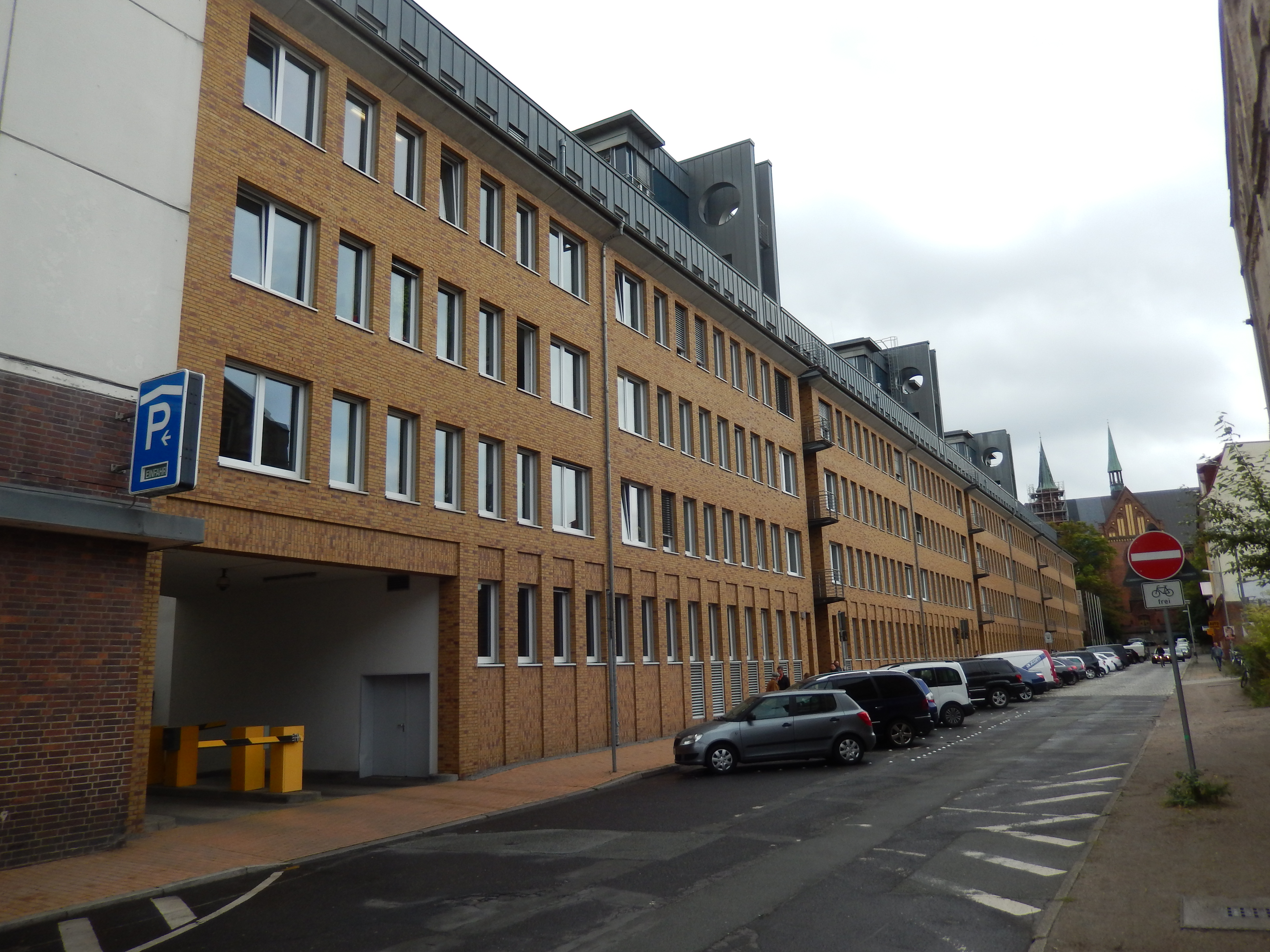 Stadthaus Schwerin, Am Packhof. Einbahnstraße für Radfahrer frei.